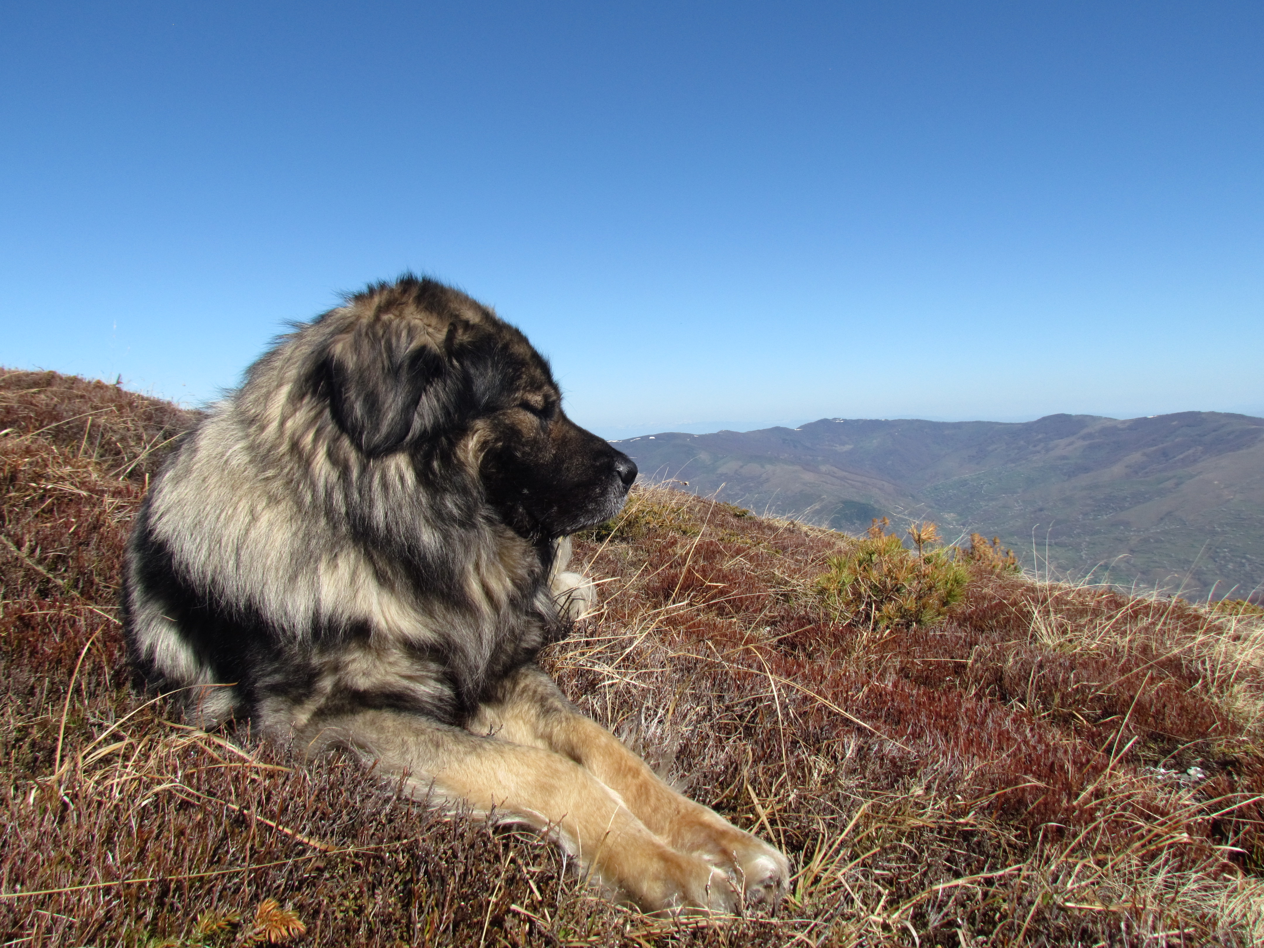 Srpski (latinica): Sar planinac